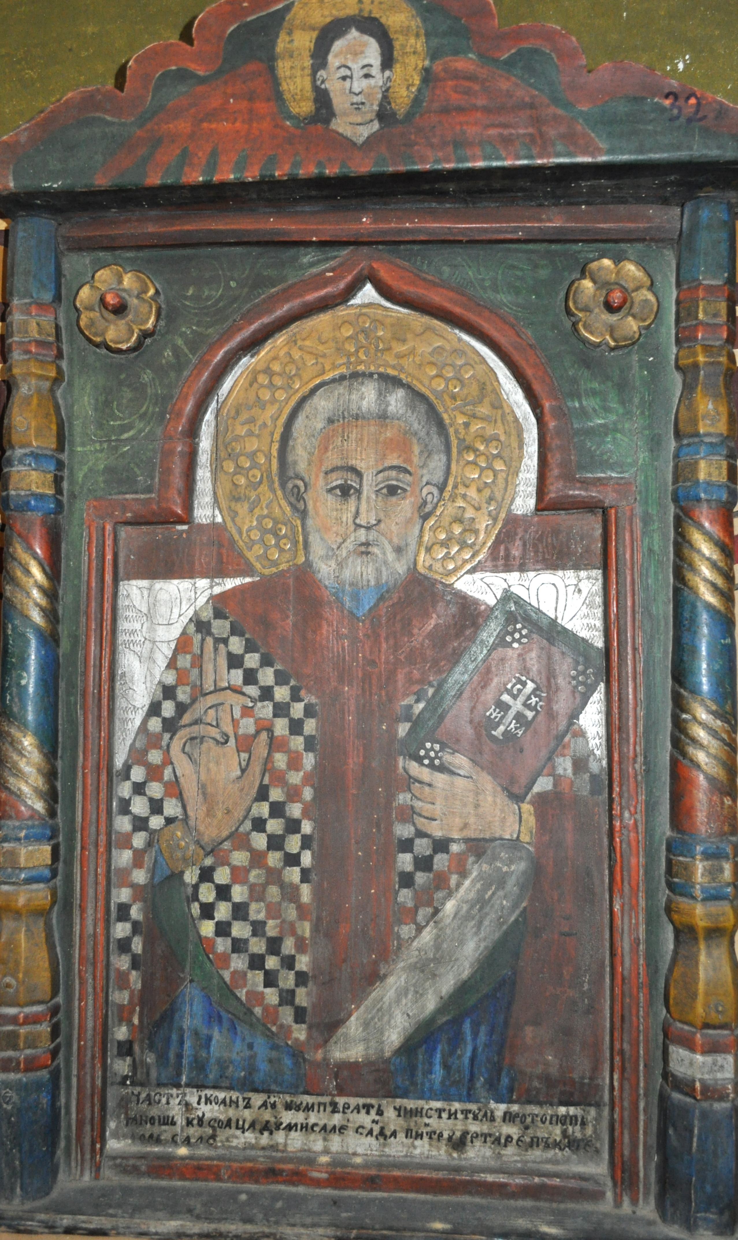 Icoană de patrimoniu din parohia Diviciorii Mari, județul Cluj